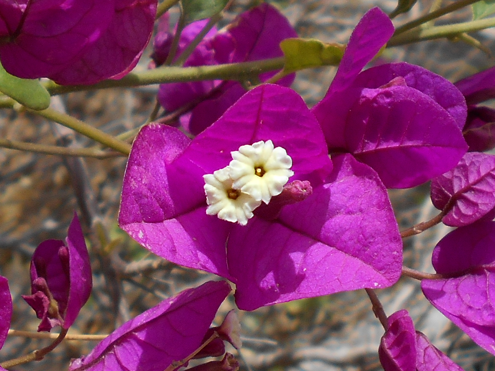 Fiori e Brattee di Bougainvillea Glabra